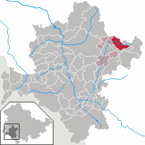 Oberschönau in Thuringia - District Schmalkalden-Meiningen